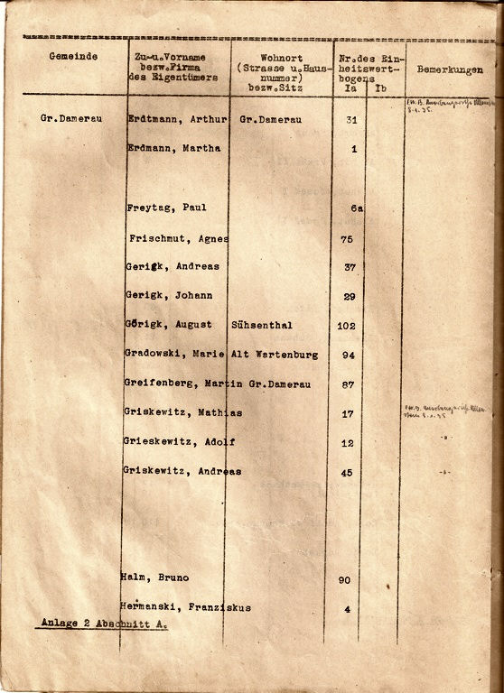 Spis właścicieli i użytkowników działek we wsi Gross Damerau (Dąbrówka Wielka), 1937 rok. (jedna ze stron)